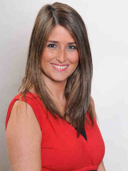 Claudia Nogueira Fernández